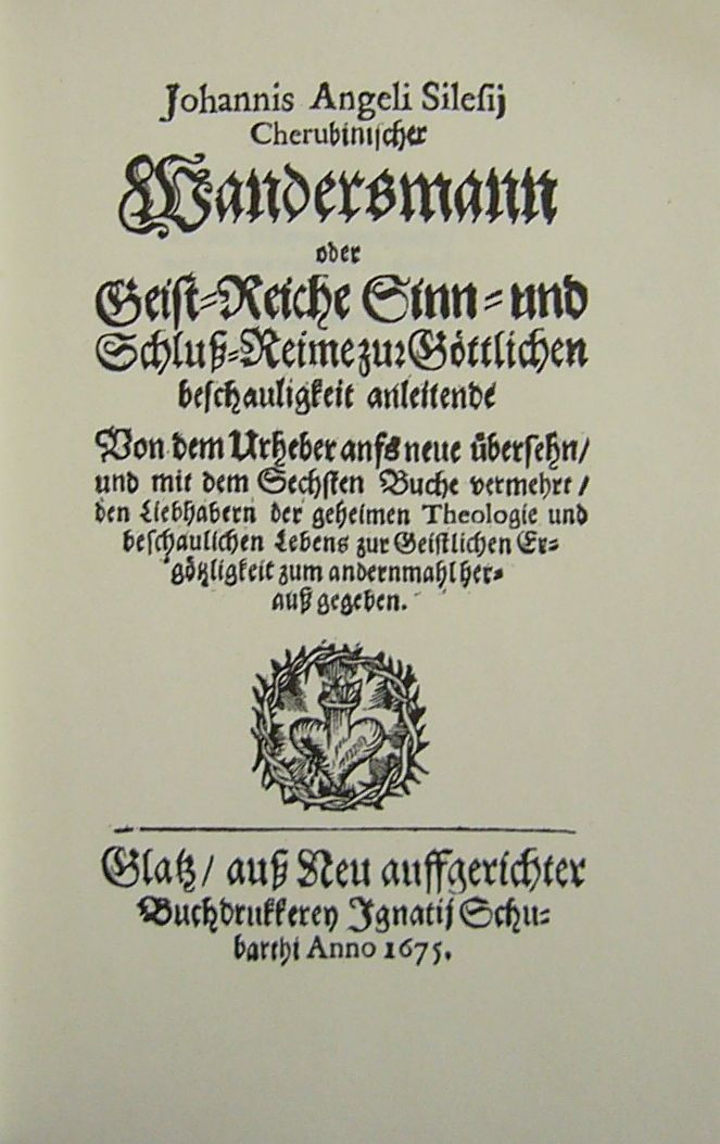 Title page of "Der Cherubinische Wandersmann" by Angelus Silesius Johannis Angeli Sileſij Cherubiniſcher Wandersmann oder Geiſt=Reiche Sinn= und Schluß=Reime zur Göttlichen beſchauligkeit anleitende Von dem Urheber anfs neue überſehn/ und mit dem Sechſten Buche vermehrt/ den Liebhabern der geheimen Theologie und beſchaulichen Lebens zur Geiſtlichen Er- götzligkeit zum andernmahl her= auß gegeben. Glatz/ auß Neu auffgerichter Buchdrukkerey Ignatij Schu= barthi Anno 1675.